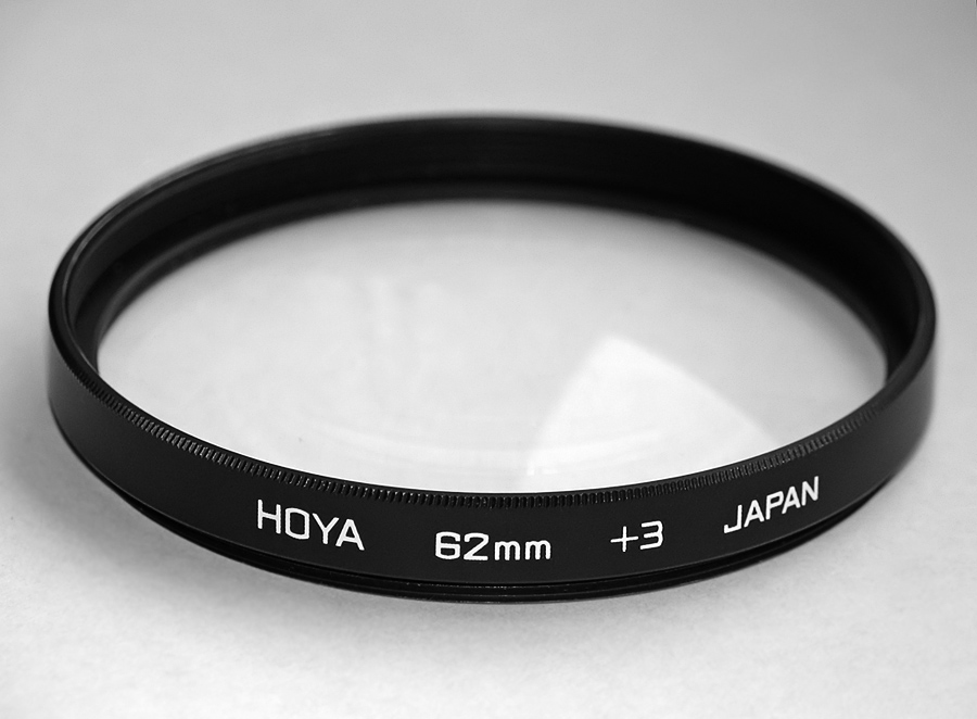 Nahlinse mit +4 Dioptrien von Hoya / Filterdurchmesser 62 mm